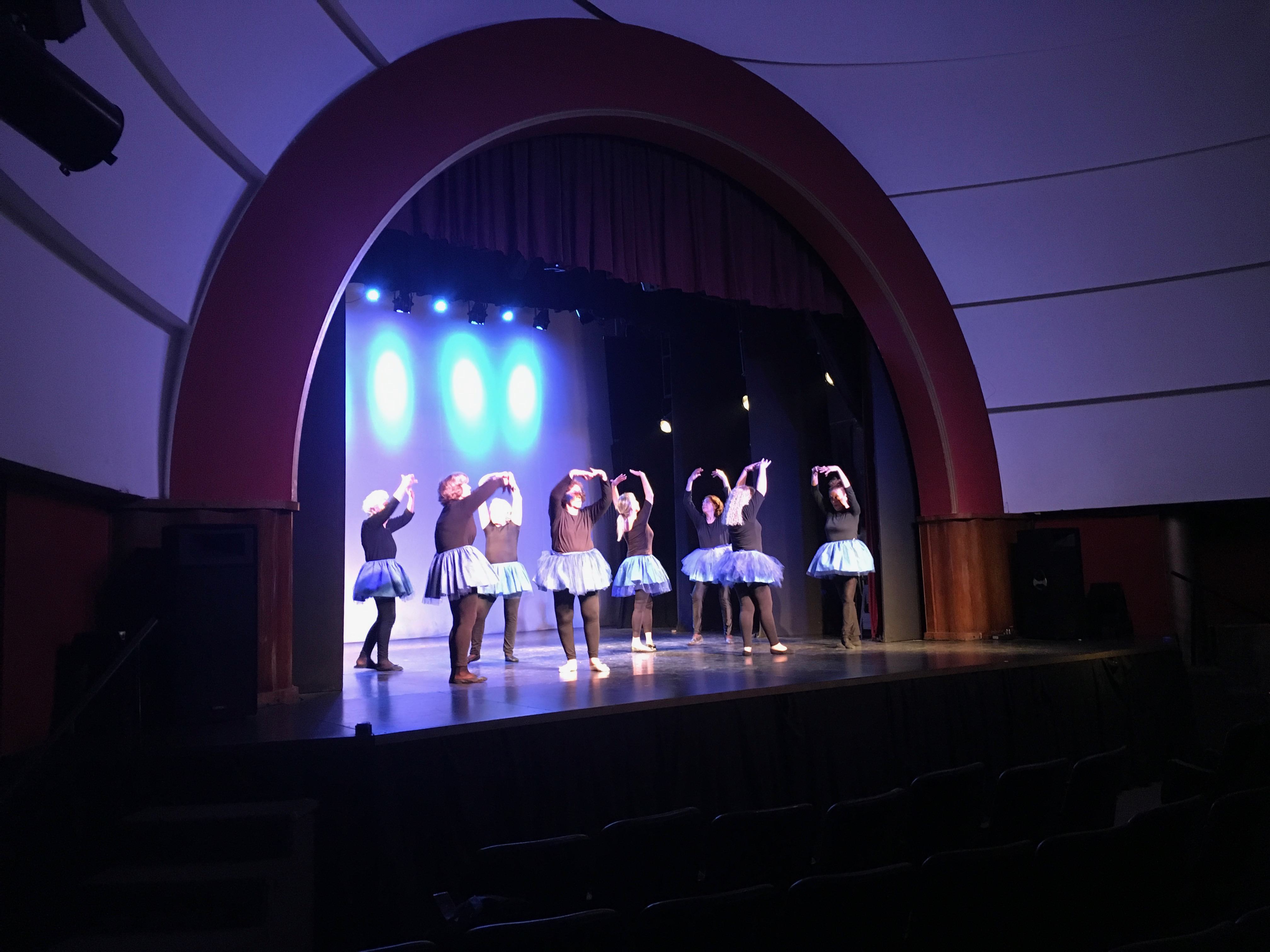 Escenario del Teatro Empire. Calle Hipólito Yrigoyen 1934 (Buenos Aires).